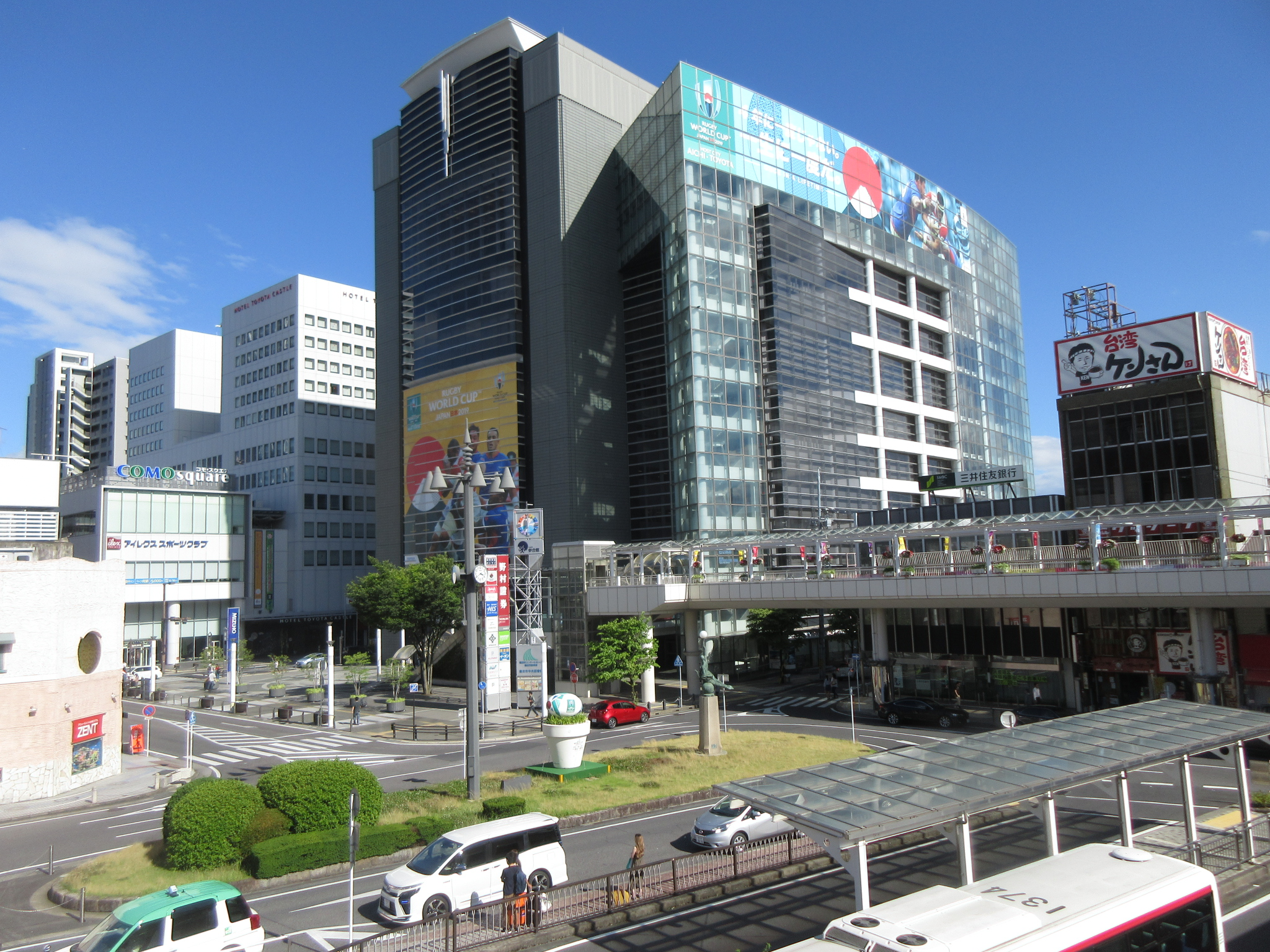 参合館、名鉄豊田市駅東口